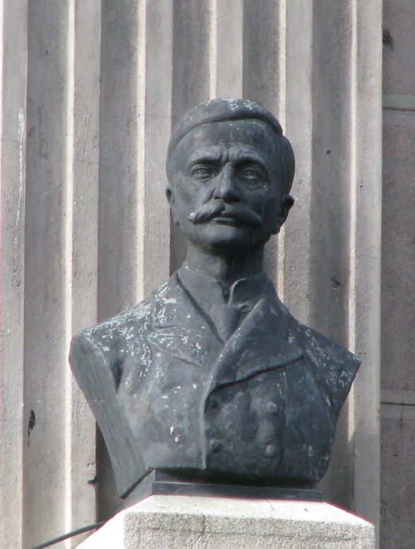 Голуб С. Јанић, биста на хотелу Балкан на Теразијама, Задужбини Самуила и Голуба С. Јанића из Маврова